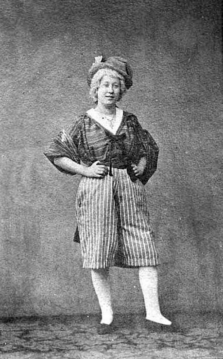 Rigolboche